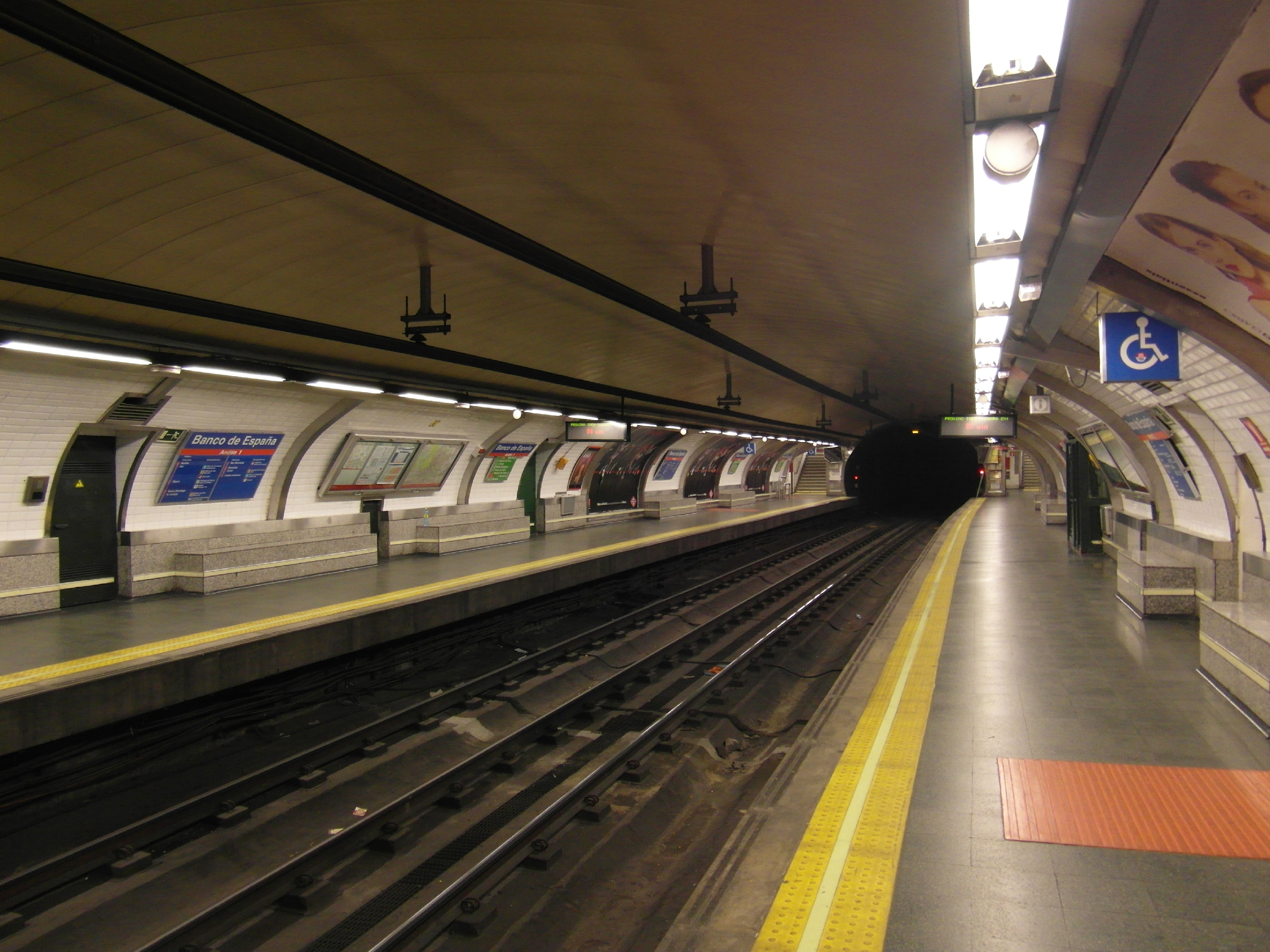 Madrid - Metro - Estación de Banco de España